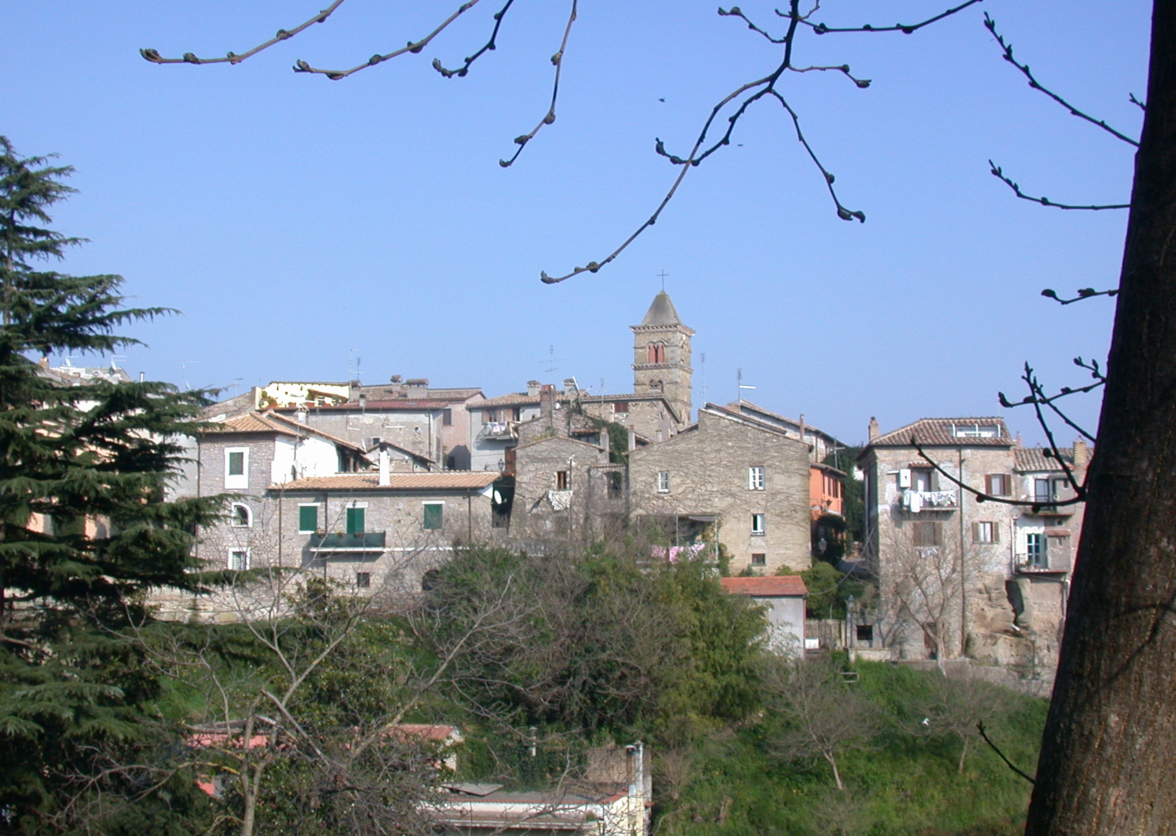 Italia, Regione Lazio, Provincia di Roma, Formello, Panorama